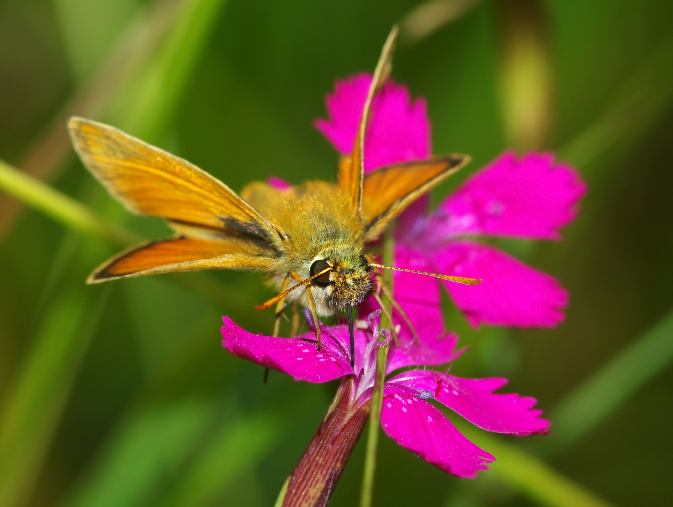 Karłątek leśny (Thymelicus sylvestris) na Goździku kropkowanym (Dianthus deltoides)